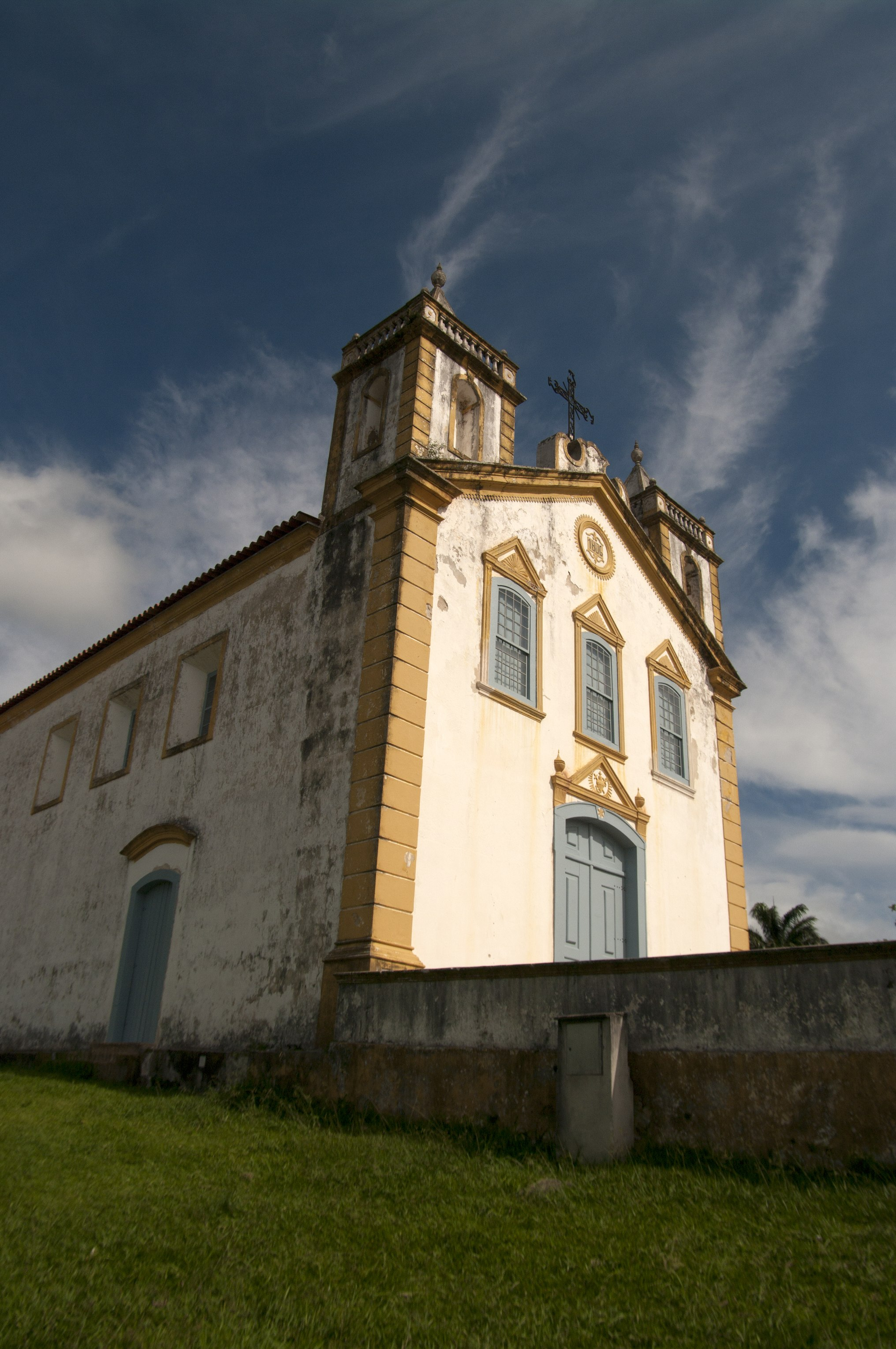 Ribeirao da Ilha